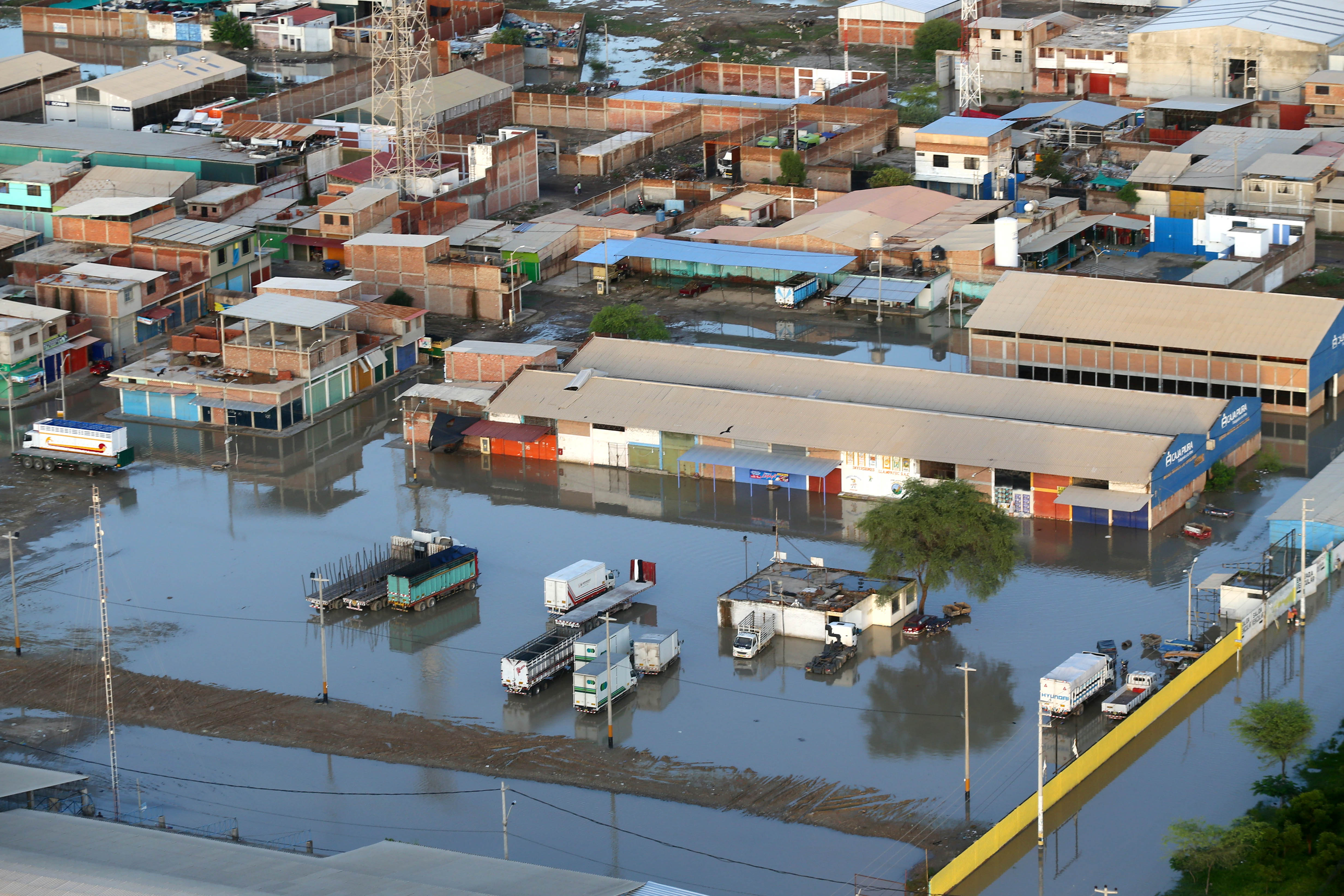 Ministro de Defensa supervisó instalación de cien carpas en el distrito de Castilla a cargo del Ejército. El ministro de Defensa, Jorge Nieto Montesinos, supervisó en el distrito de Castilla la instalación de uno de los seis refugios que se viene alistando en Piura, con la participación del Ejército del Perú, para albergar a las familias que pudieran perder o hayan perdido su hogar a consecuencia de las inundaciones y huaicos.